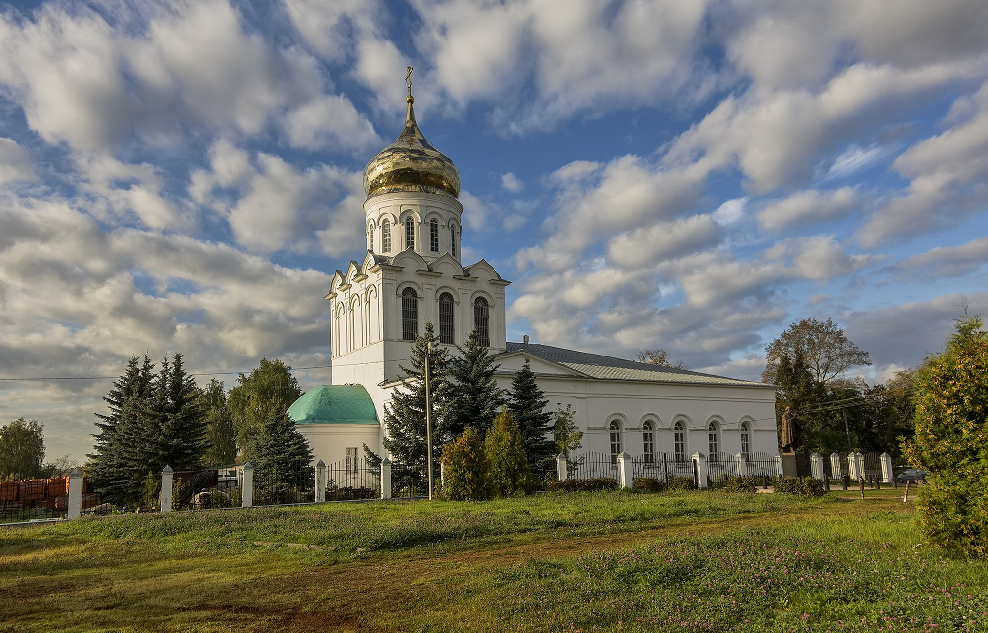 Христорождественский собор: переулок Советский, 11, Александров, Александровский район, Владимирская область